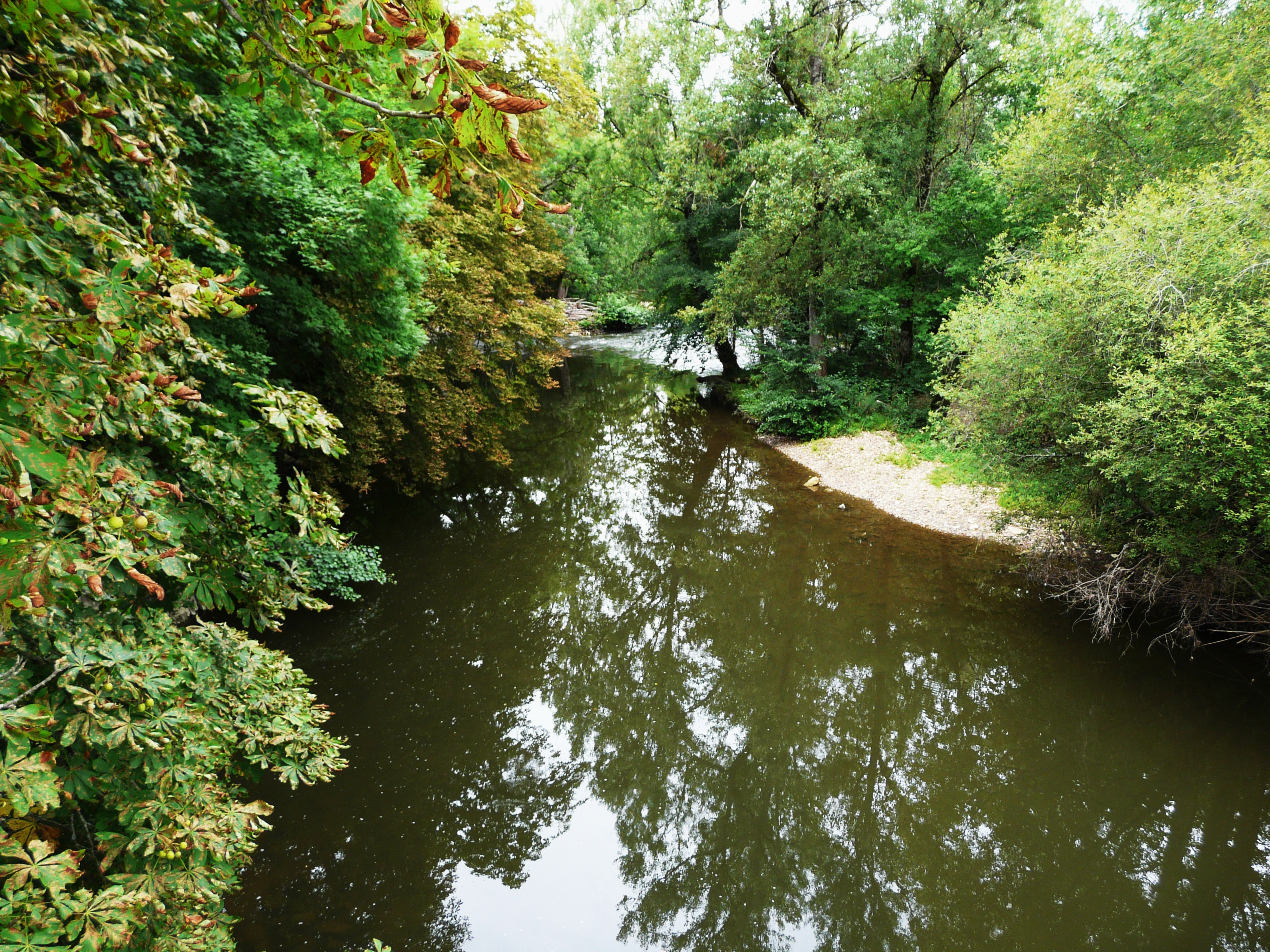 L'Isle en aval du pont de la route départementale 4, au bourg de Mayac, Dordogne, France